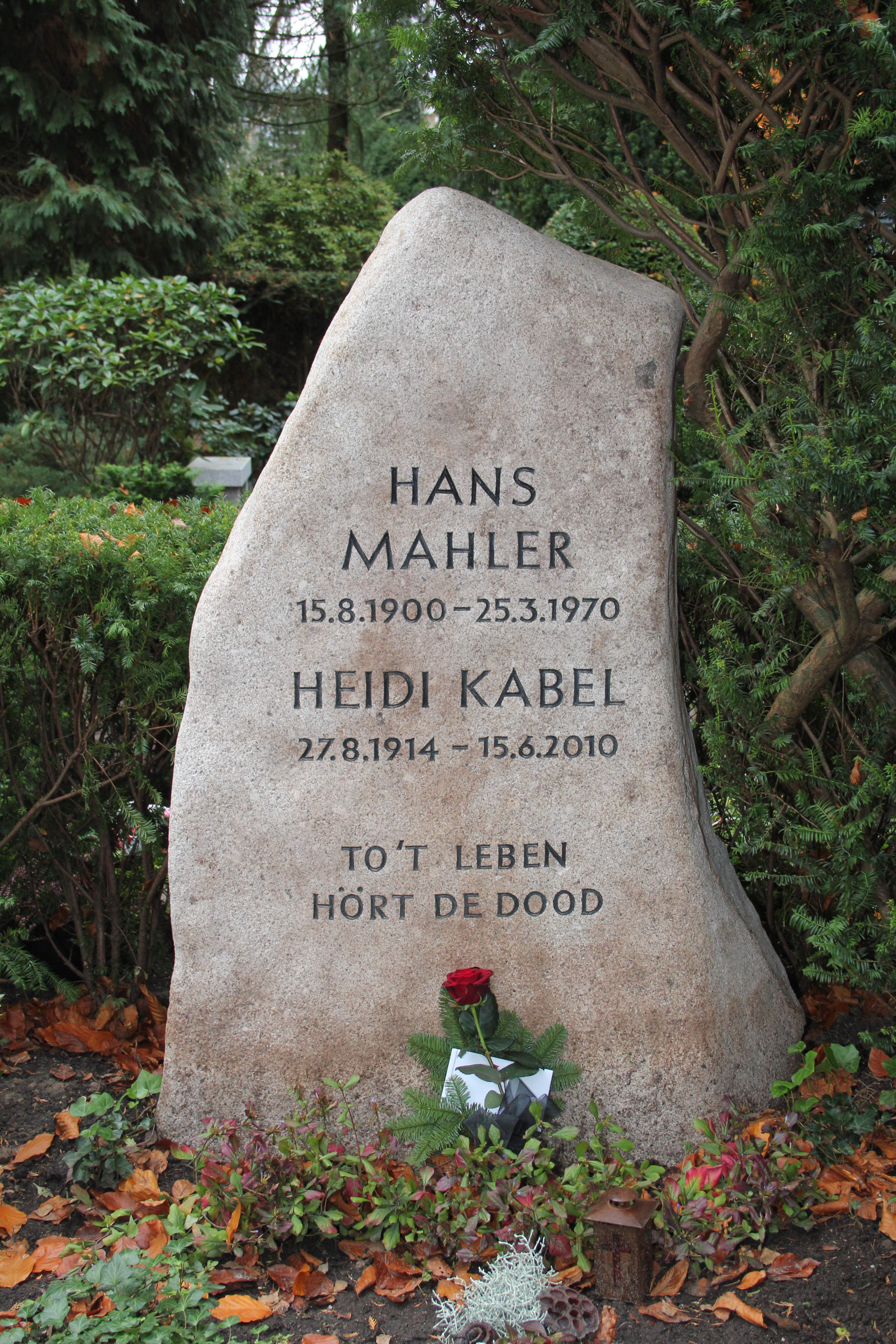 Grab von Hans Mahler und Heidi Kabel auf dem Nienstedtener Friedhof, Hamburg